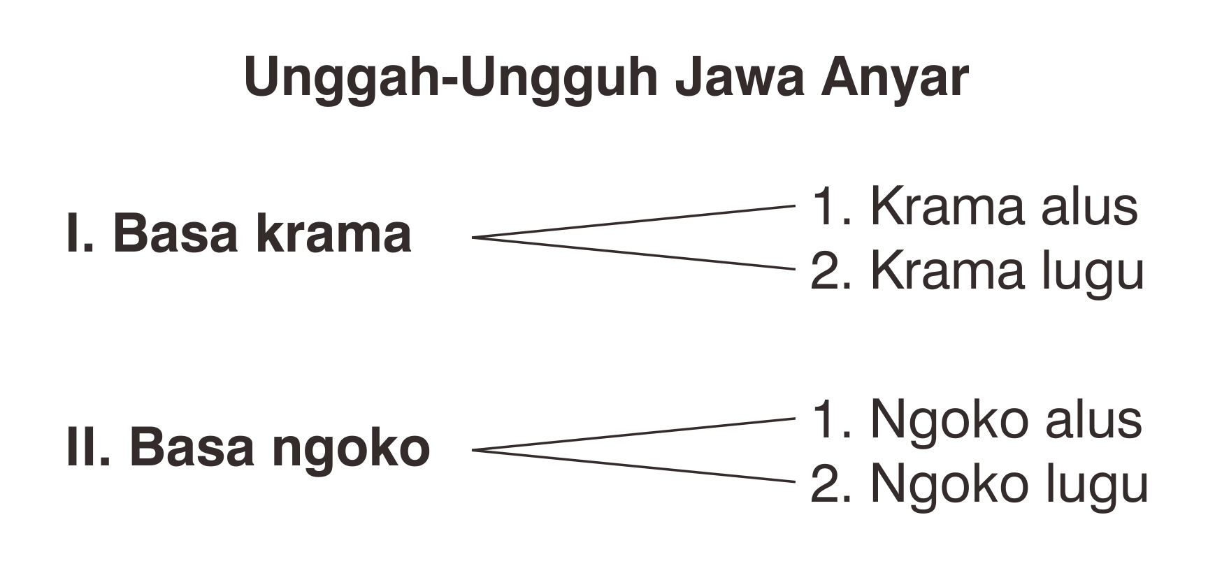 Tingkatan bahasa Jawa baru berdasarkan buku oleh Suwadji (2013). Ngoko Krama. Yogyakarta: Balai Bahasa Provinsi Daerah Istimewa Yogyakarta. ISBN 9786027777620. OCLC 890814963.